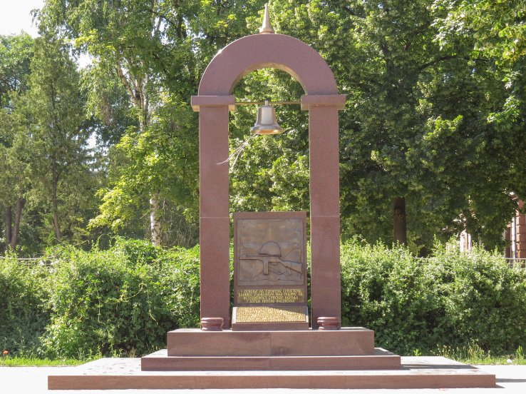 Српски (ћирилица): Споменик изгинулим црвеноармејцима у "Нишком инциденту" 7. новембра 1944. године